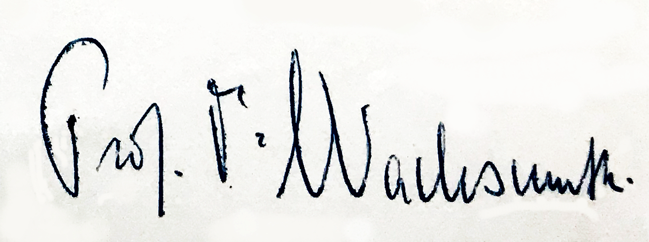 Unterschrift von Werner Wachsmuth auf einem Dokument. Abfotografiert vom Original.